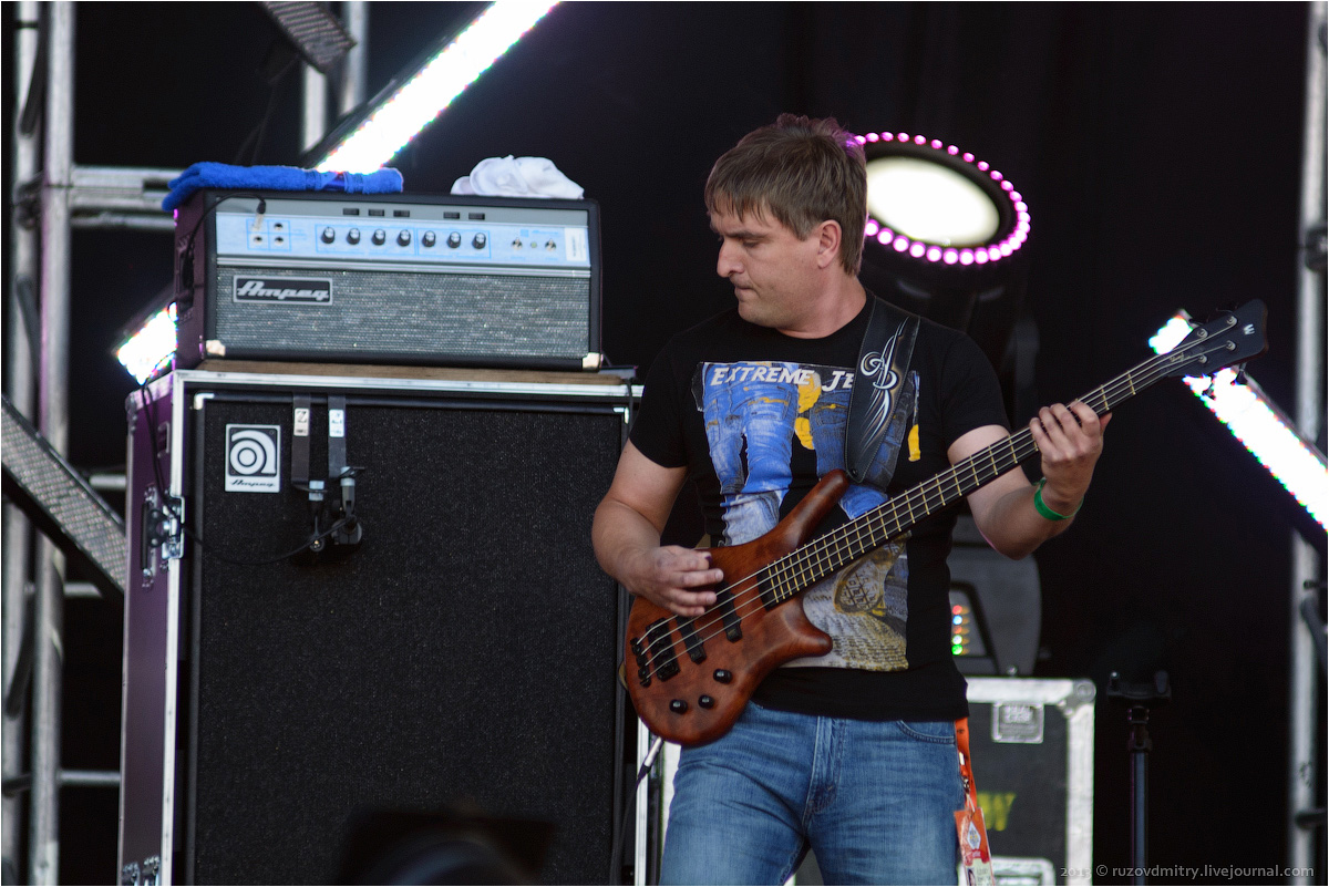 Романюк Алексей Николаевич, группа "Чиж & Co", фестиваль "Рок над Волгой" 2013